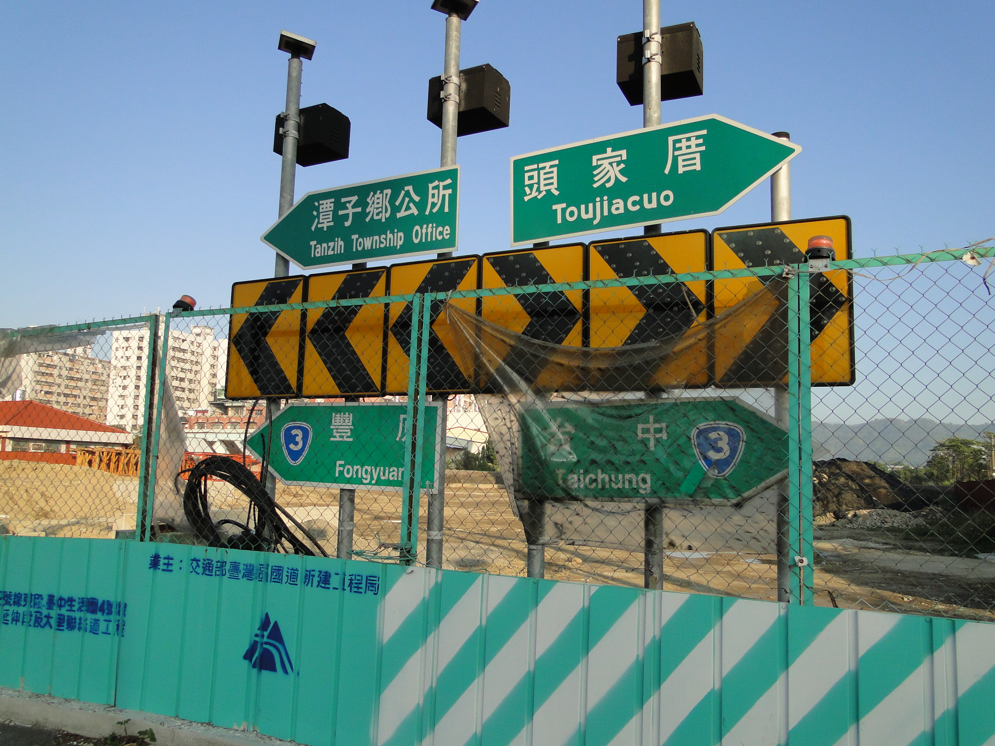 中文（台灣）: 台灣台中市北屯路、環中路口東方的指標，以及預備興建的台中生活圈四號道路潭子段工地。